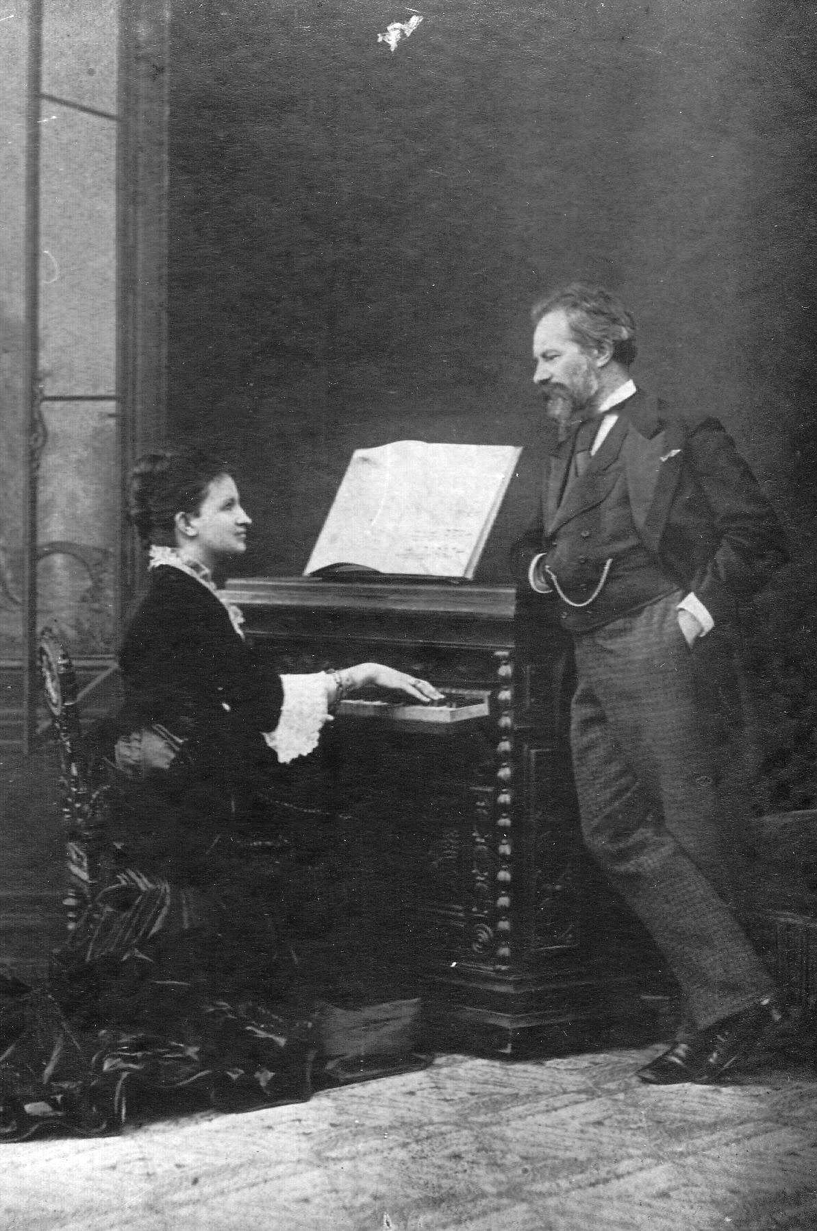 Пианистка профессор А.Н.Есипова и профессор Ф.О.Лешетицкий